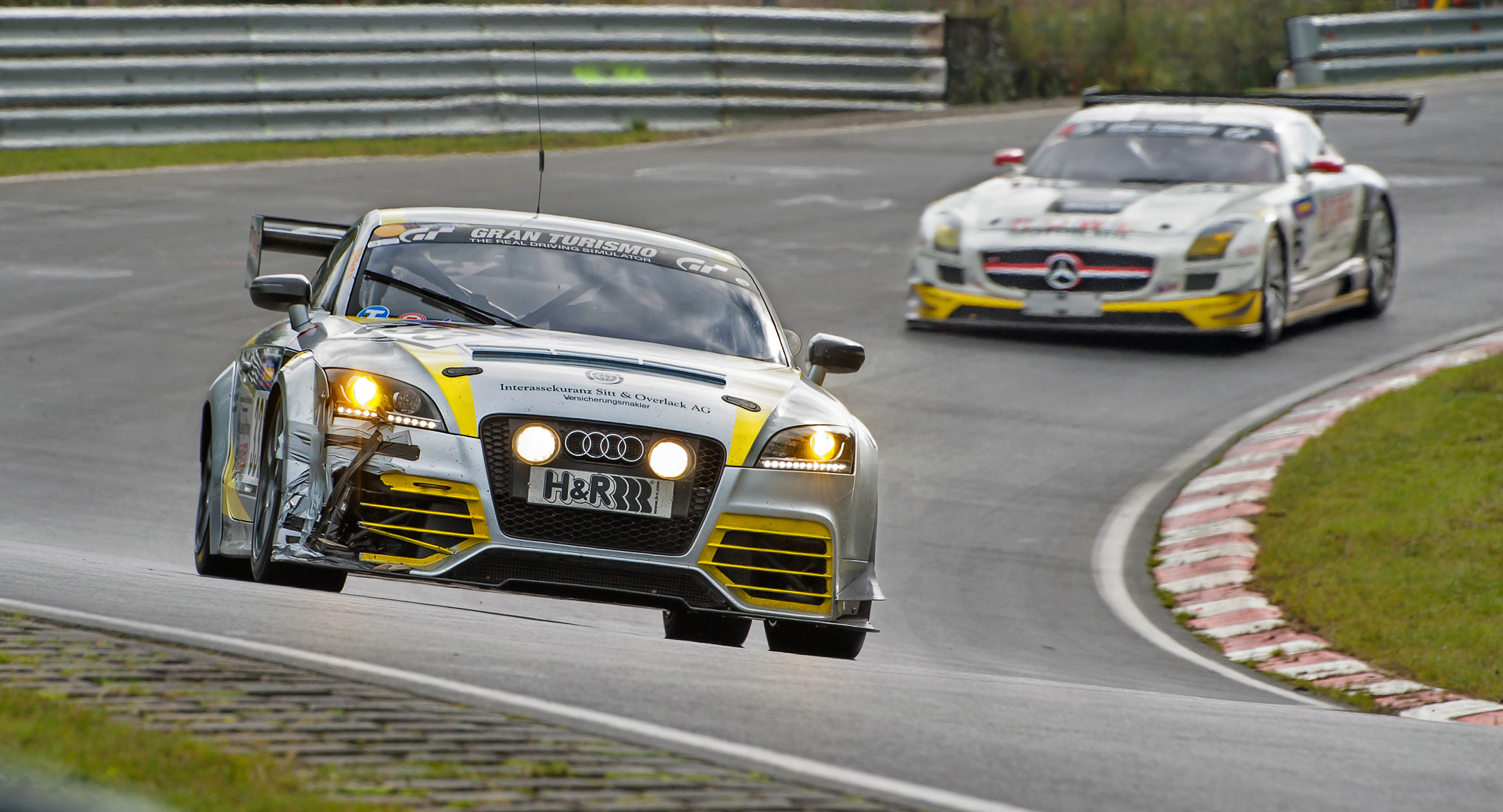 Audi TT beim 9. Lauf der VLN-Serie auf dem Nürburgring.